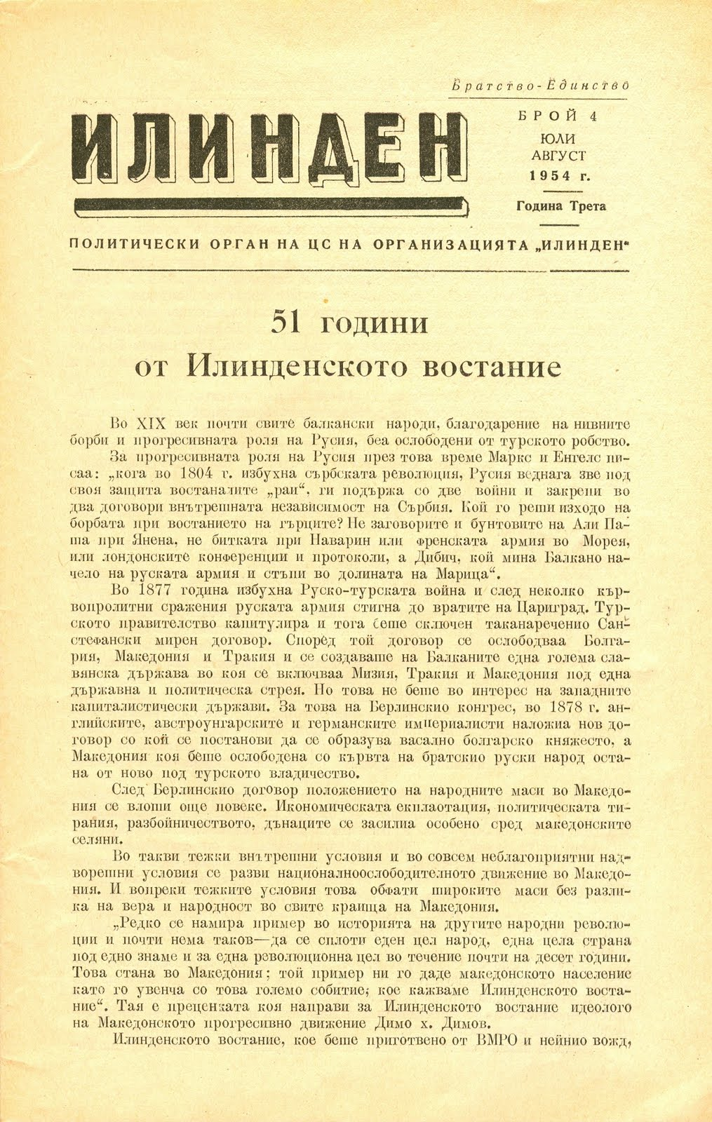 Първа страница на вестника "Илинден", бр. 4 от юли-август 1954 година.